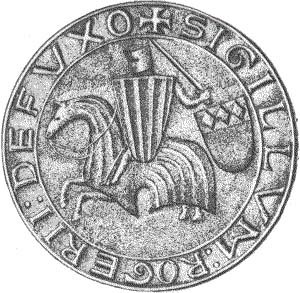 Sceau de Roger IV de Foix + SIGILLUM : ROGERII : DE FUXO